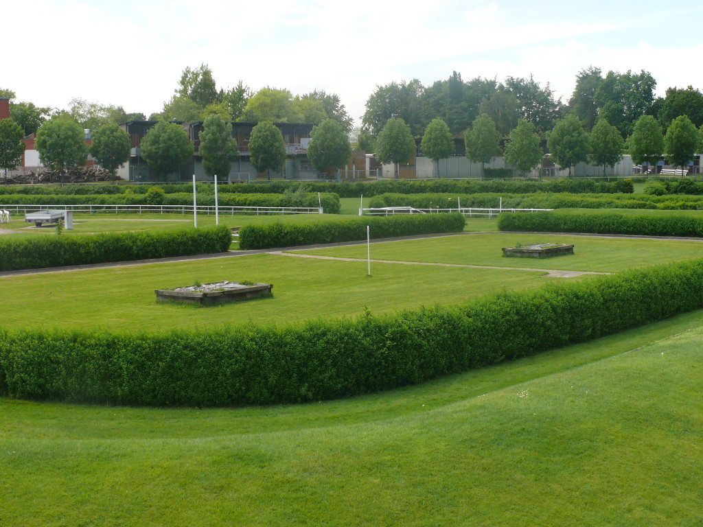 Führing 2010 der Horner Rennbahn